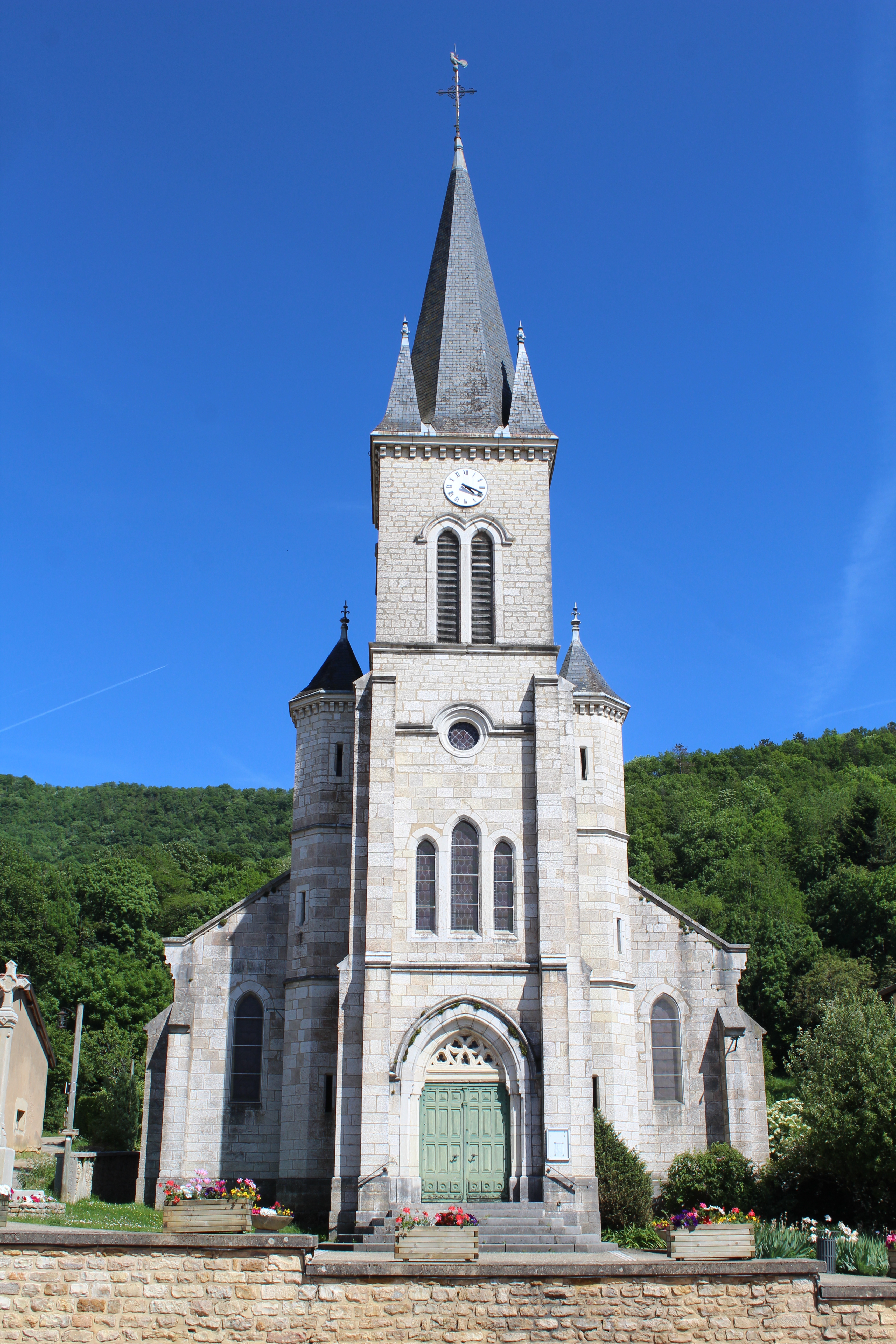 Église Saint-Clément de Cuisiat.